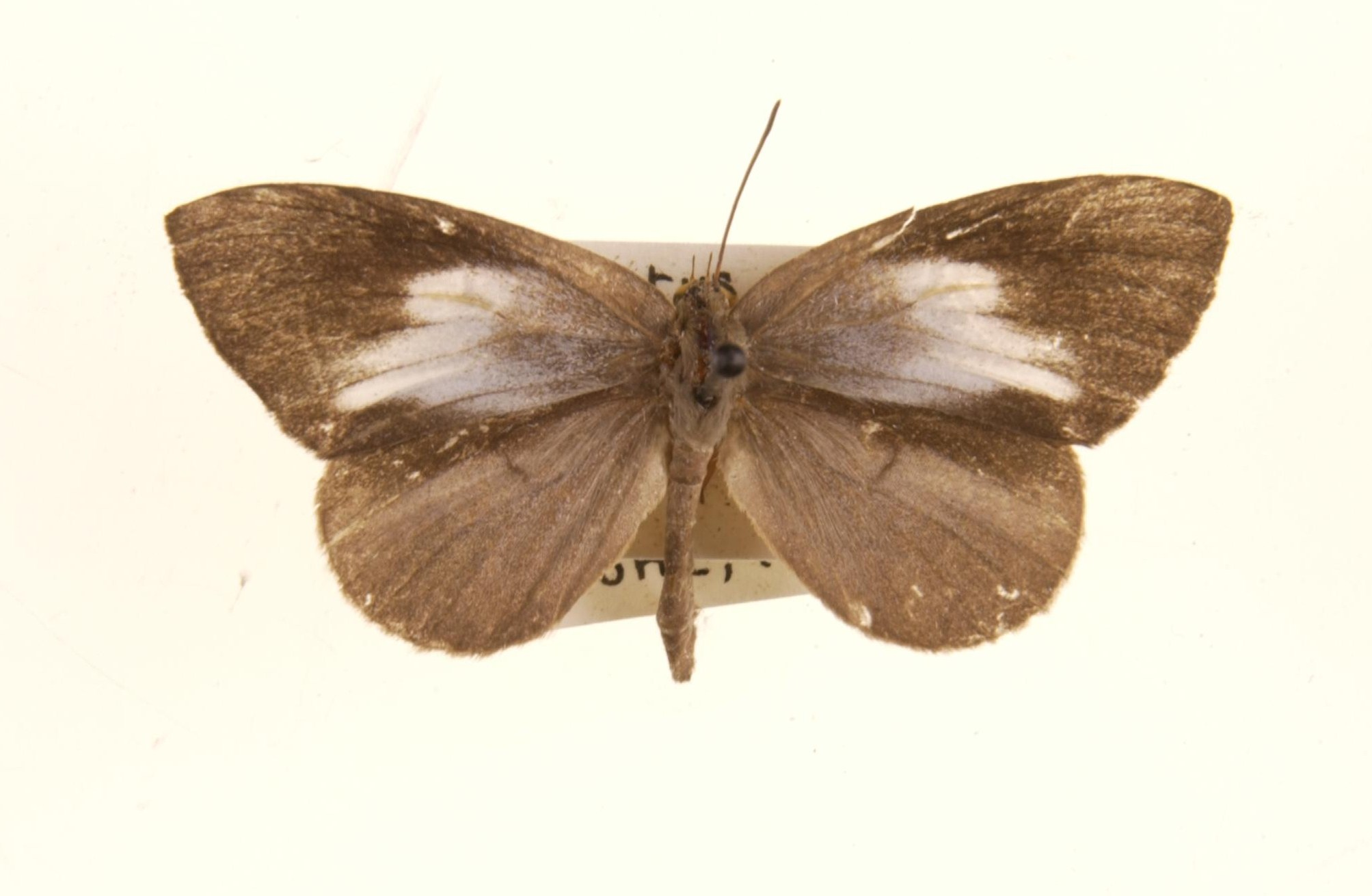 Miletus symethus male